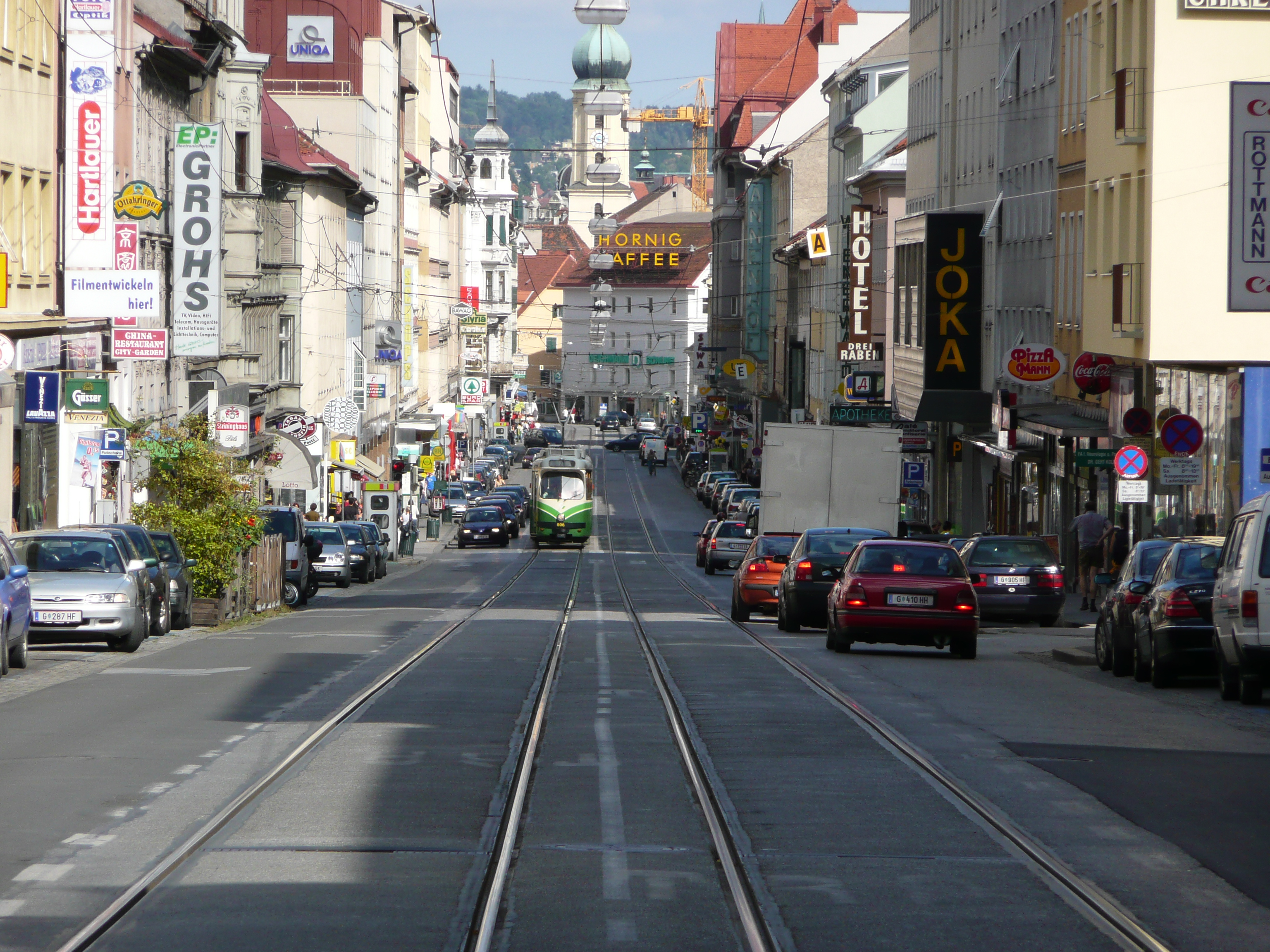 Strassenbahn in der Annenstrasse, Graz